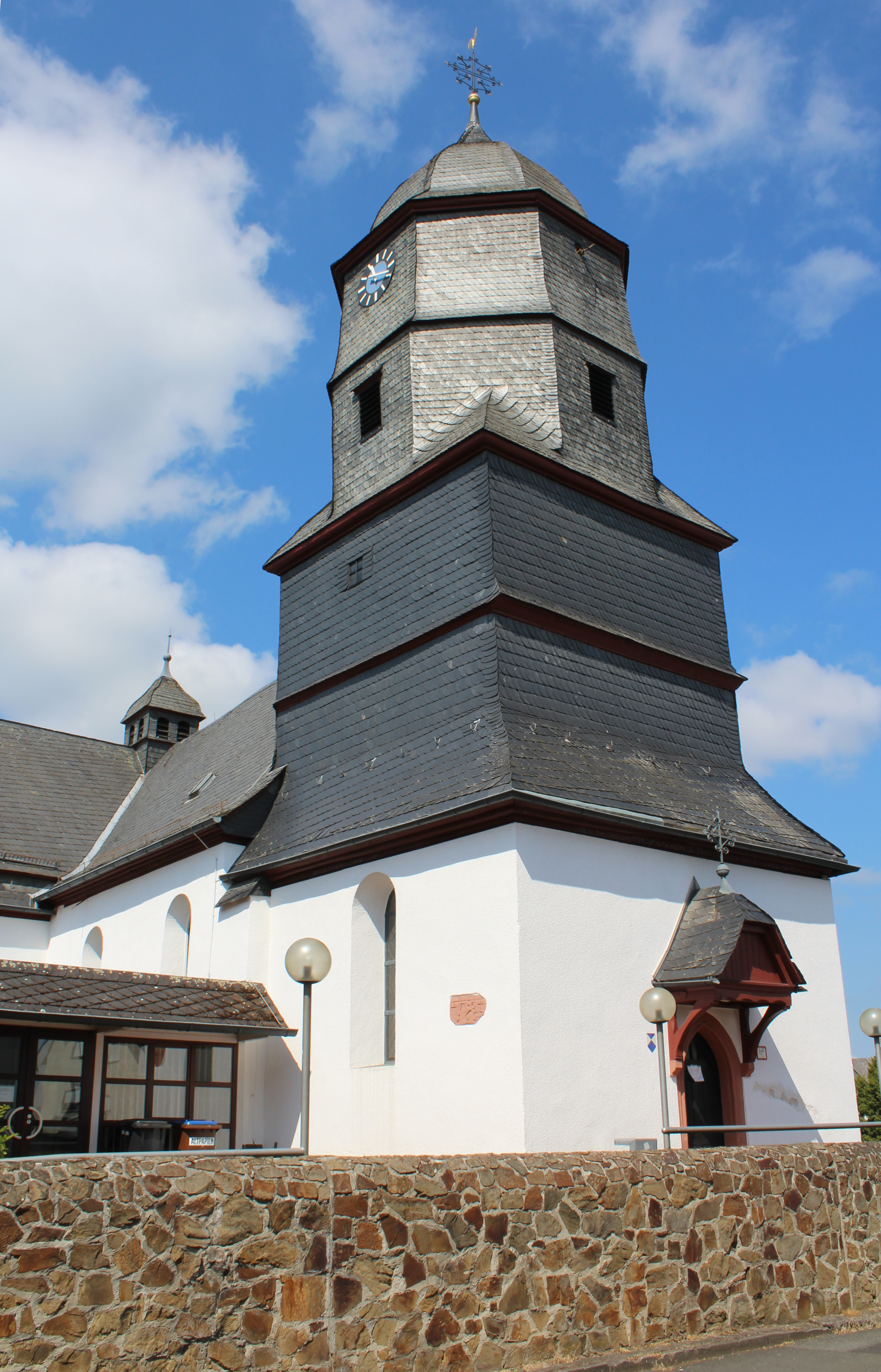 Evangelische Kirche Wetzlar-Dutenhofen, Lahn-Dill-Kreis, Hessen, Deutschland